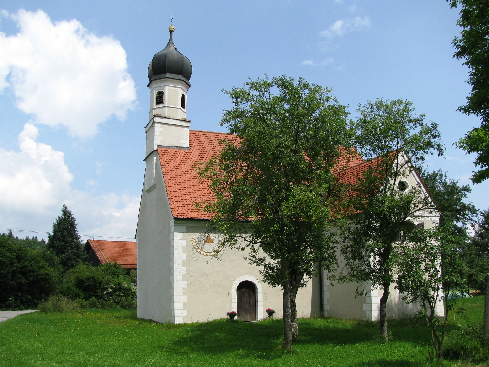 Kapelle St. Stephan in Stillern.